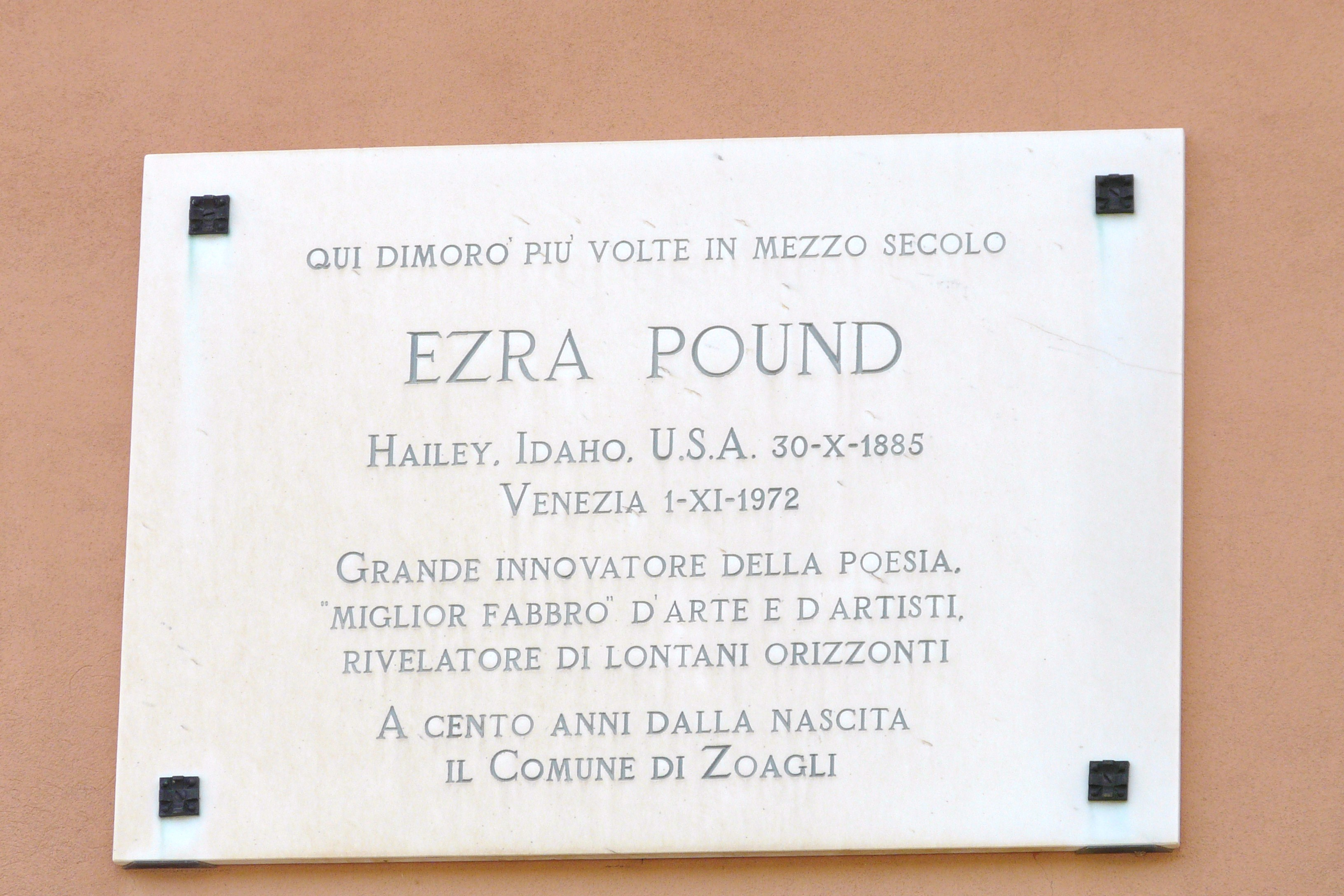 Targa ad Ezra Pound presso Sant'Ambrogio, Zoagli, Liguria, Italia